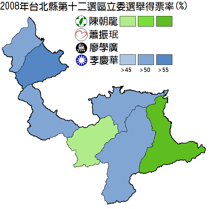 2008年臺北縣第十二選區立委選舉得票